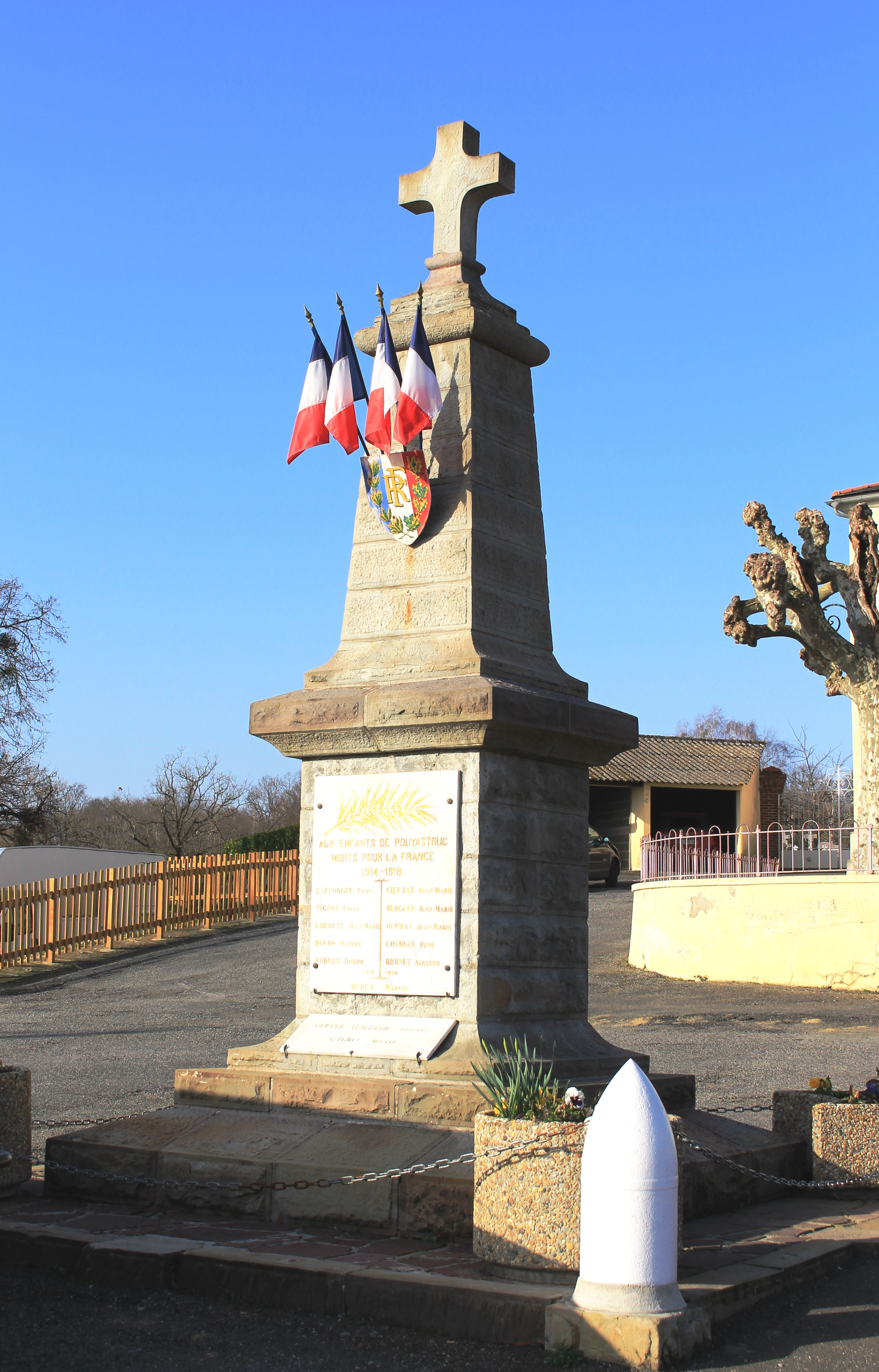 Monument aux morts de Pouyastruc (Hautes-Pyrénées)